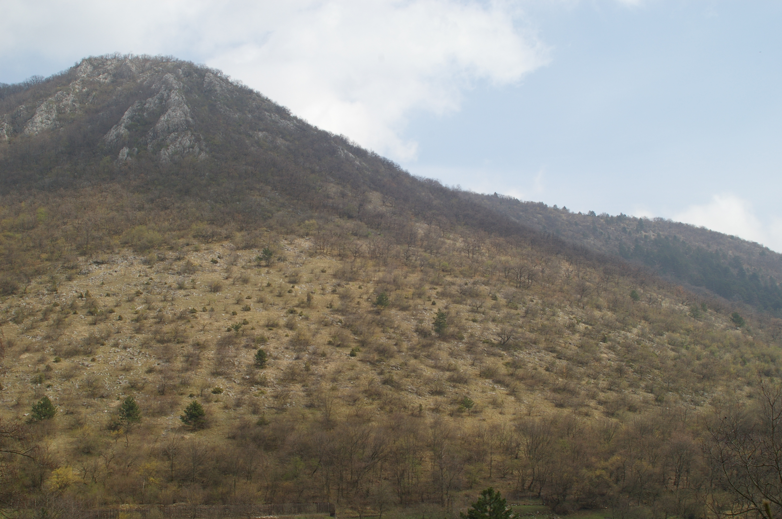 Jasovská planina od Zádielské planinySlovenčina: Jasovsa planina from Zadielská planina